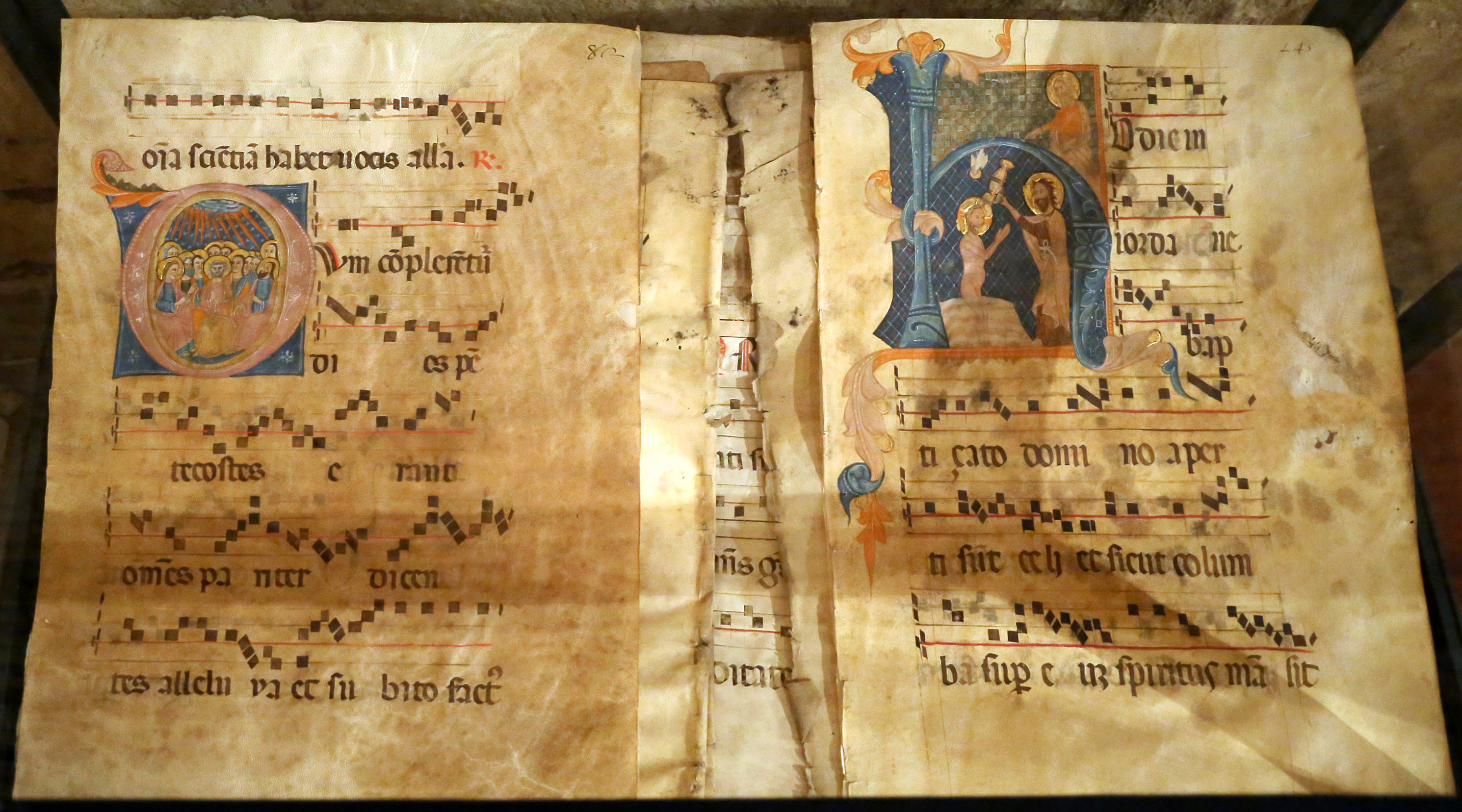 Piazza Santa Maria Maggiore